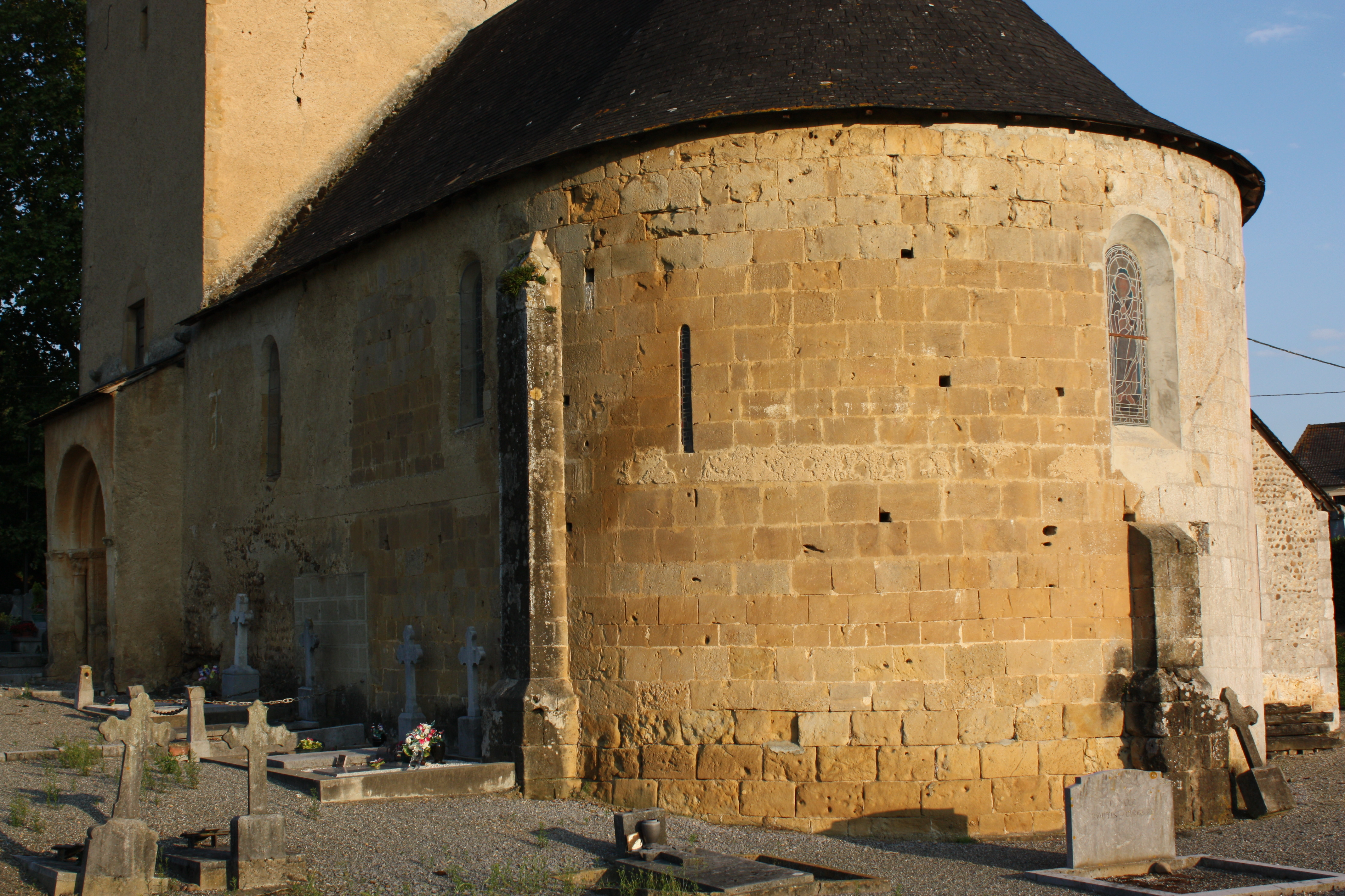 Eglise de Lannecaube, Pyrénées Atlantiques